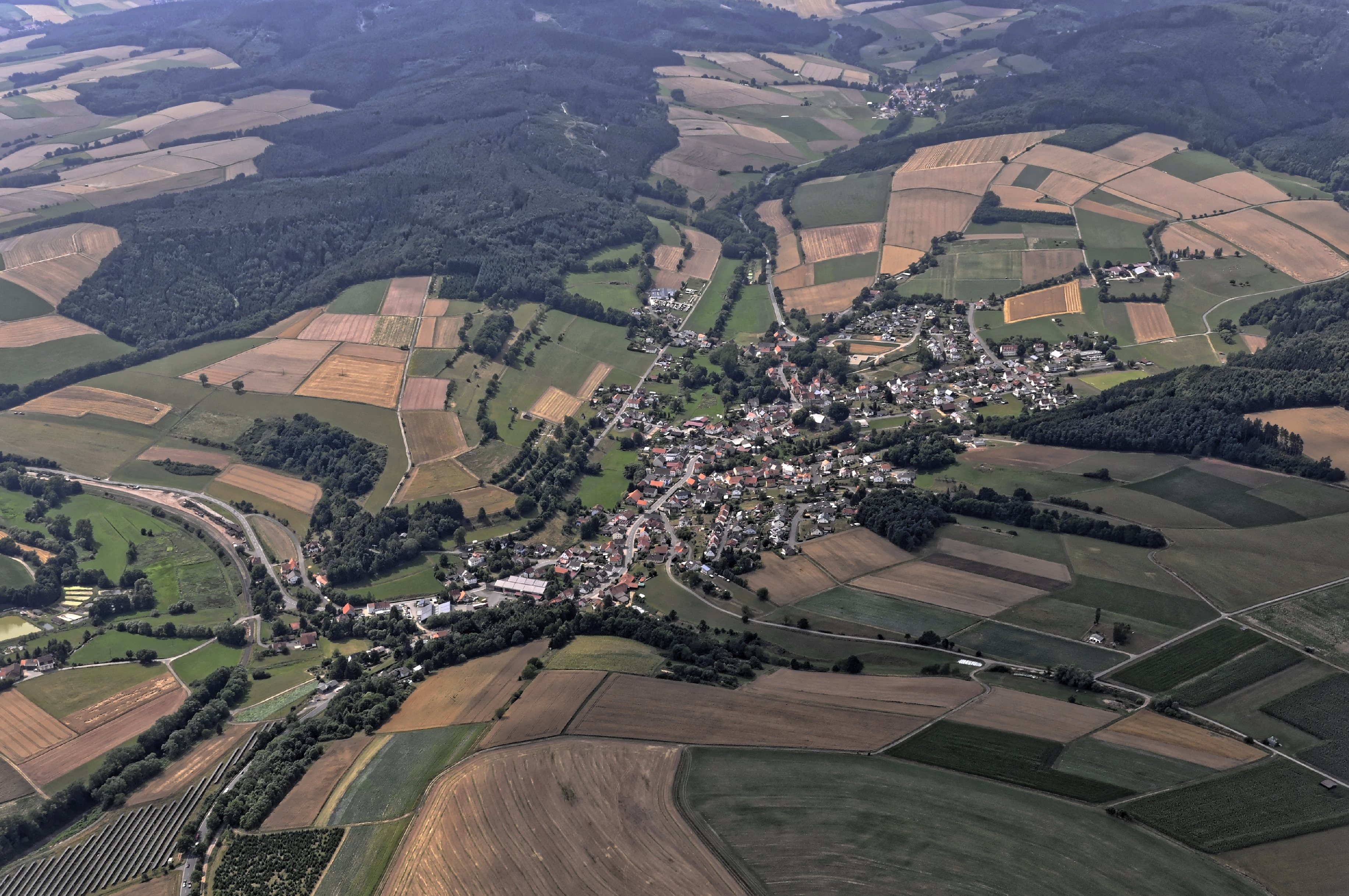 Bilder vom Flug Nordholz-Hammelburg 2015: Breitenbach am Herzberg